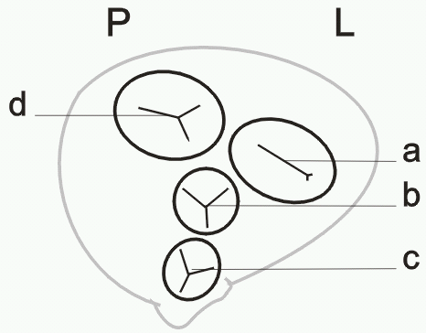 valvules in human heart